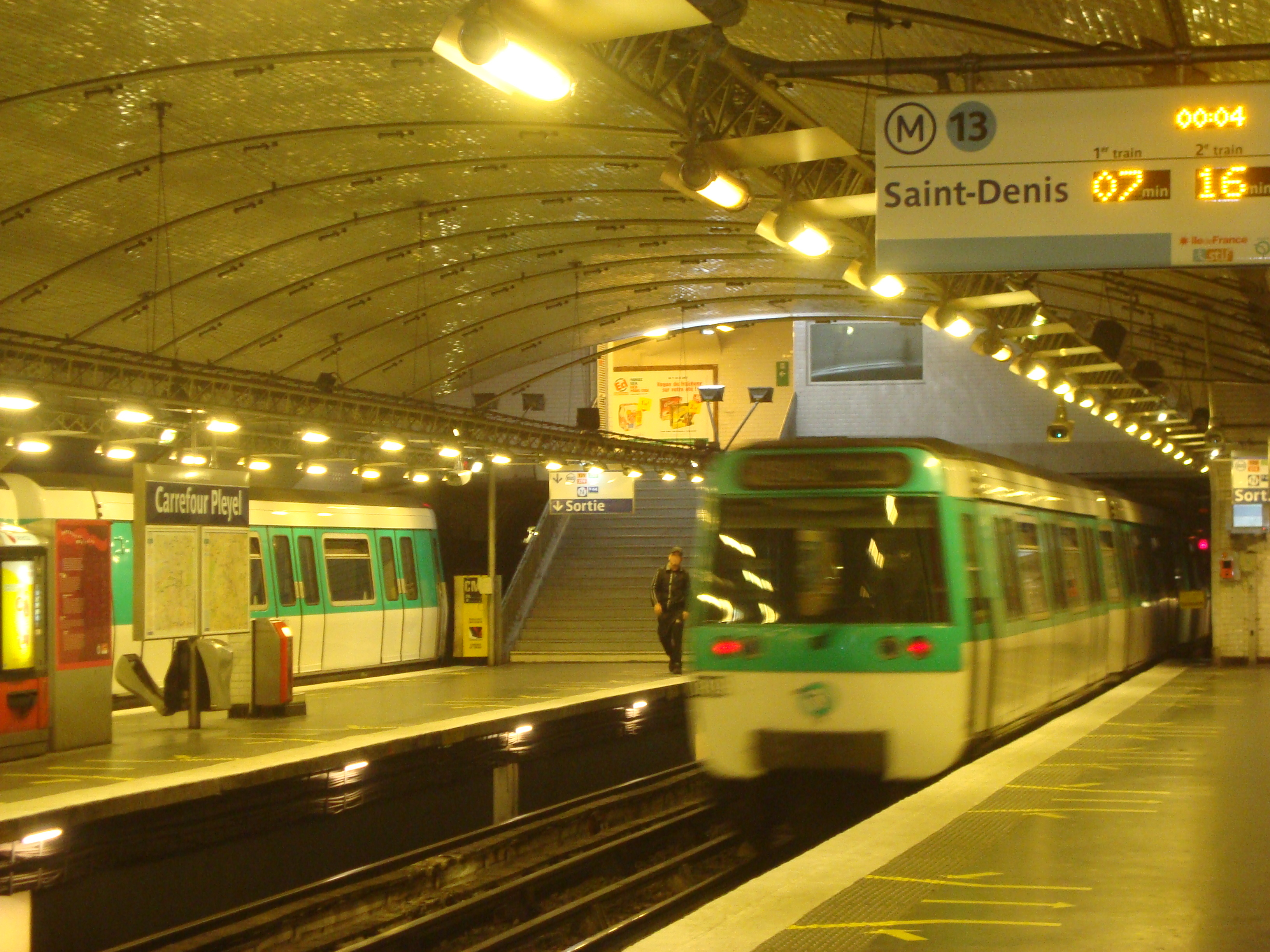 Quais de la station Carrefour Pleyel de la ligne 13 du métro de Paris